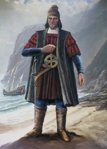 Bartolomeu-Dias